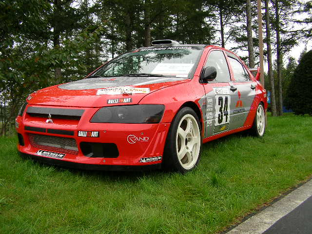 Kristian Sohlberg's Mitsubishi Lancer WRC2 (#34, 2003 Rallye Deutschland).